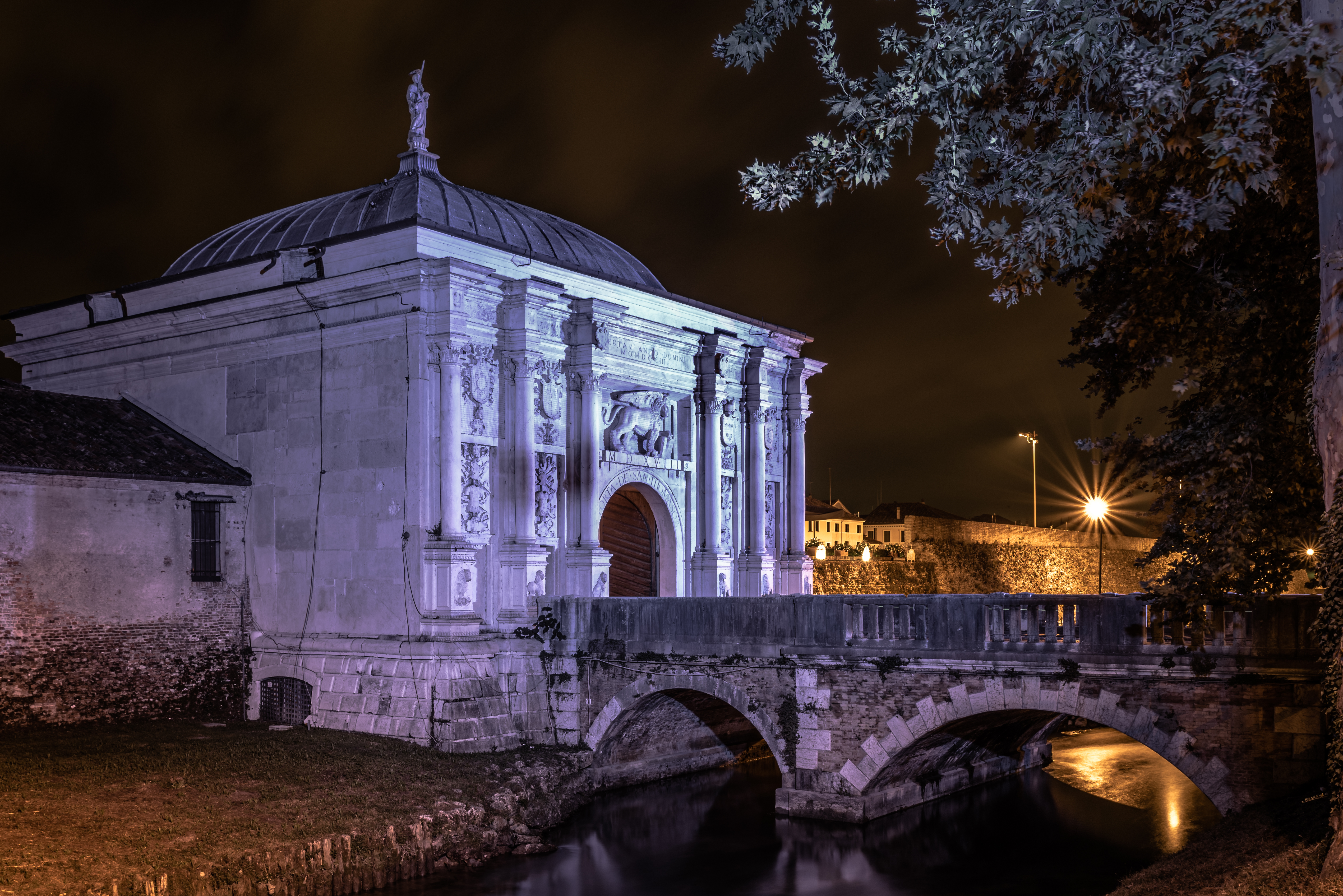 Porta San Tomaso This is a photo of a monument which is part of cultural heritage of Italy.